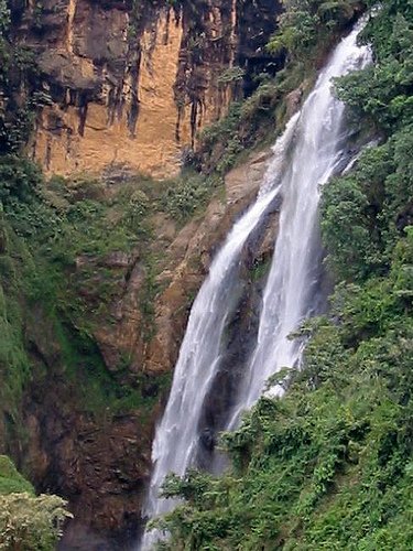 Cascada que hace la quebrada Magallo en Concordia Antioquia.